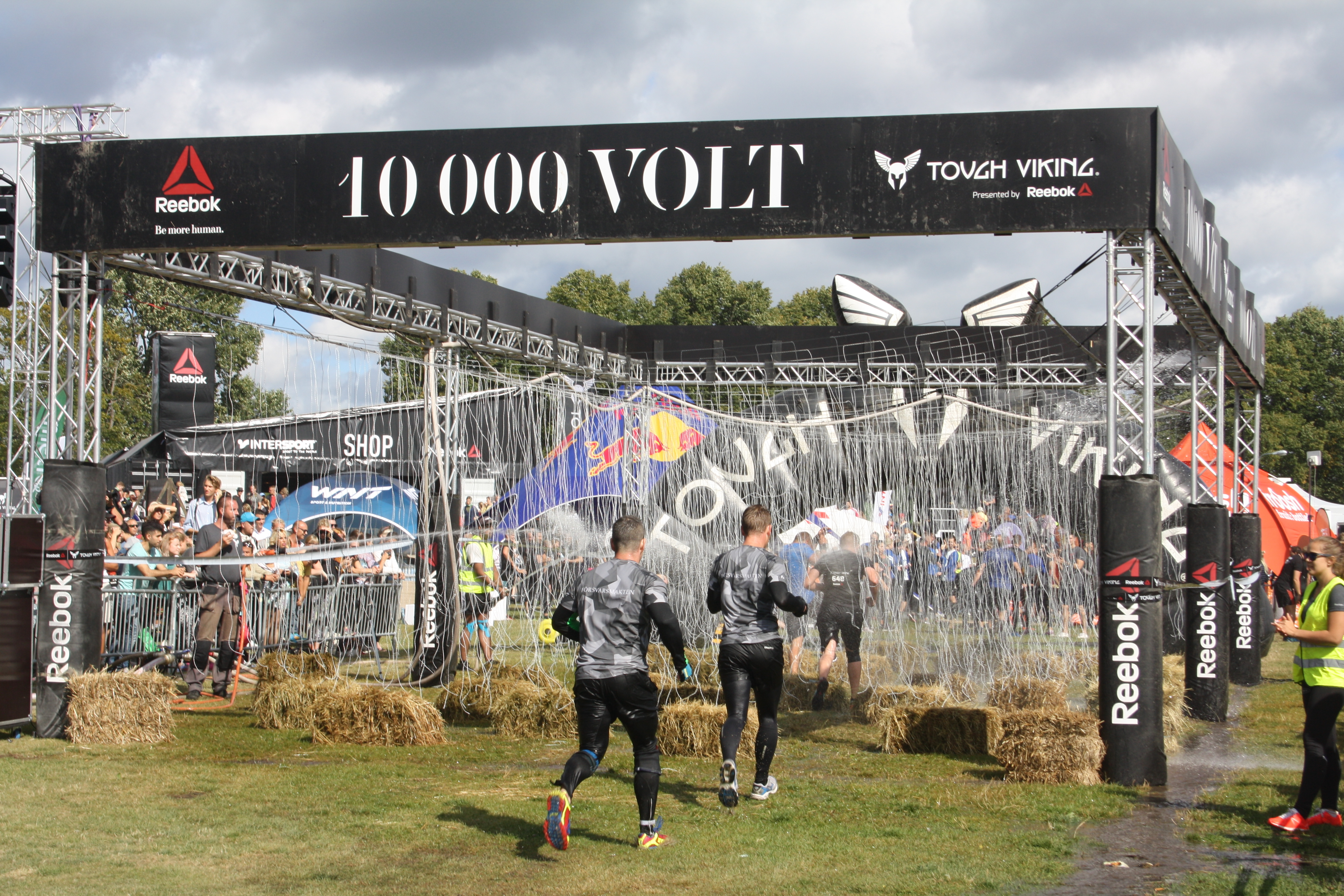 Tough Viking i Stockholm, 2015